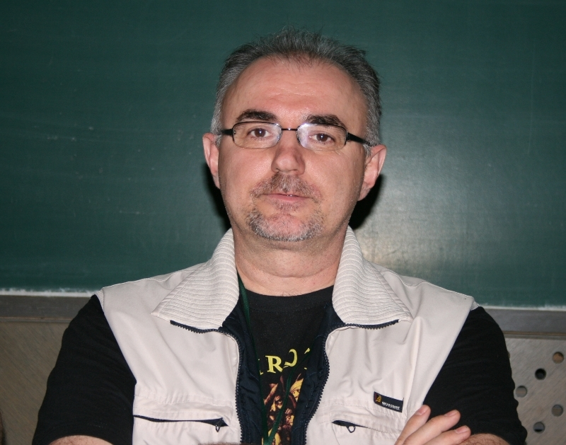 Goran Skrobonja na SFeraKonu